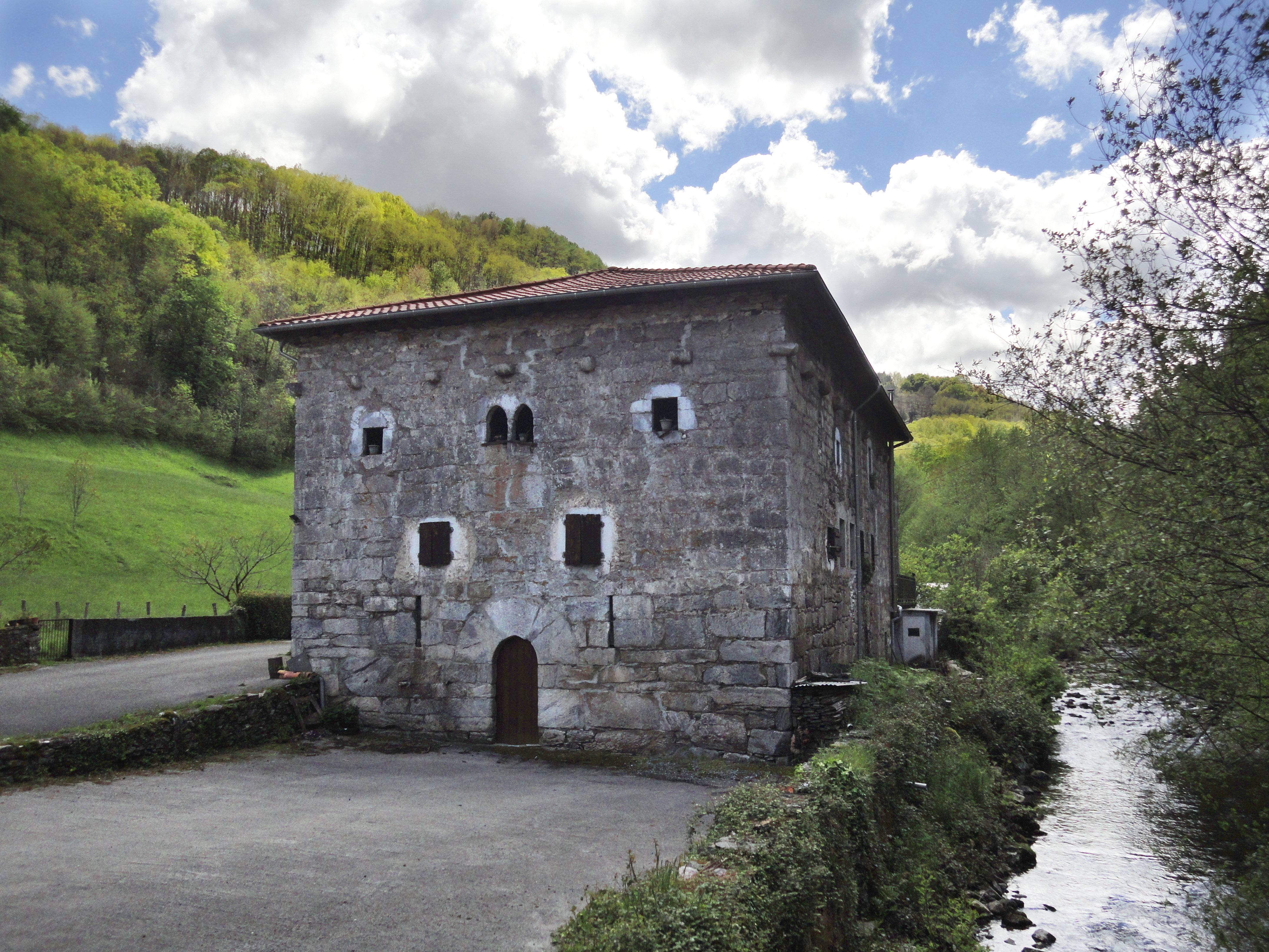 Aranibar jauregia - Arantza